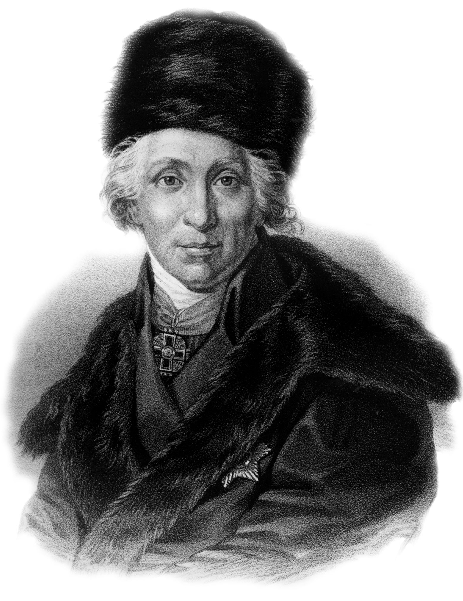 G. DERYAVINE. Съ гравирован. рисунка. Лит. А. Мюнстера, СПБ. Imp. Lith. A. Munster (Editeur)